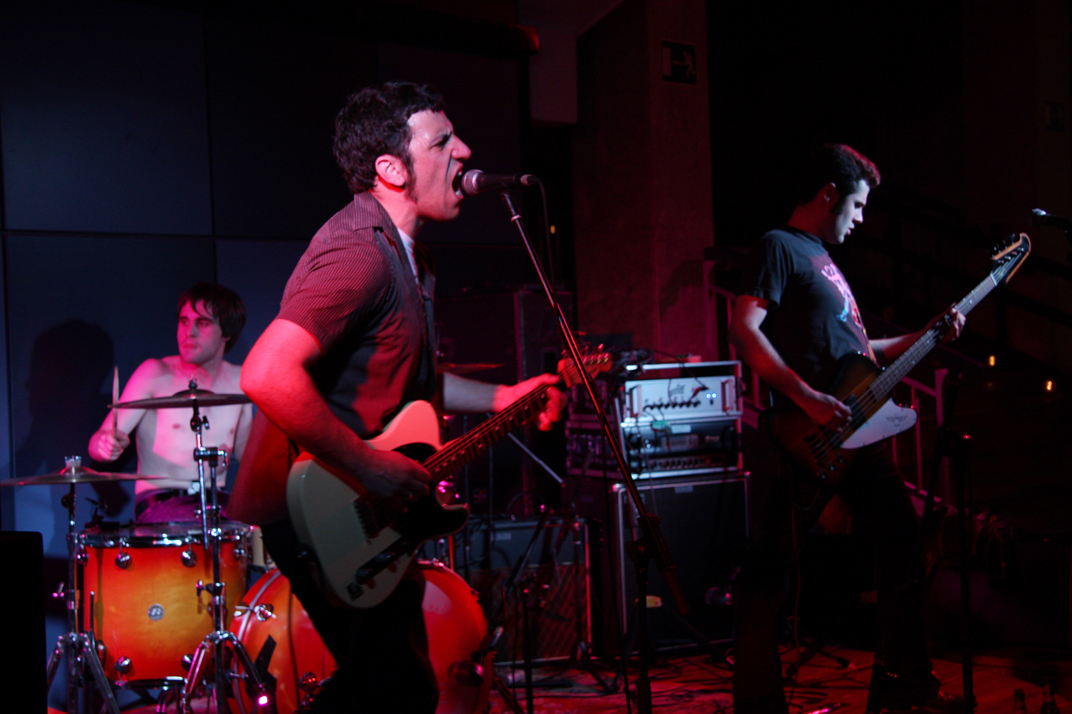 Los Cretinos rock band